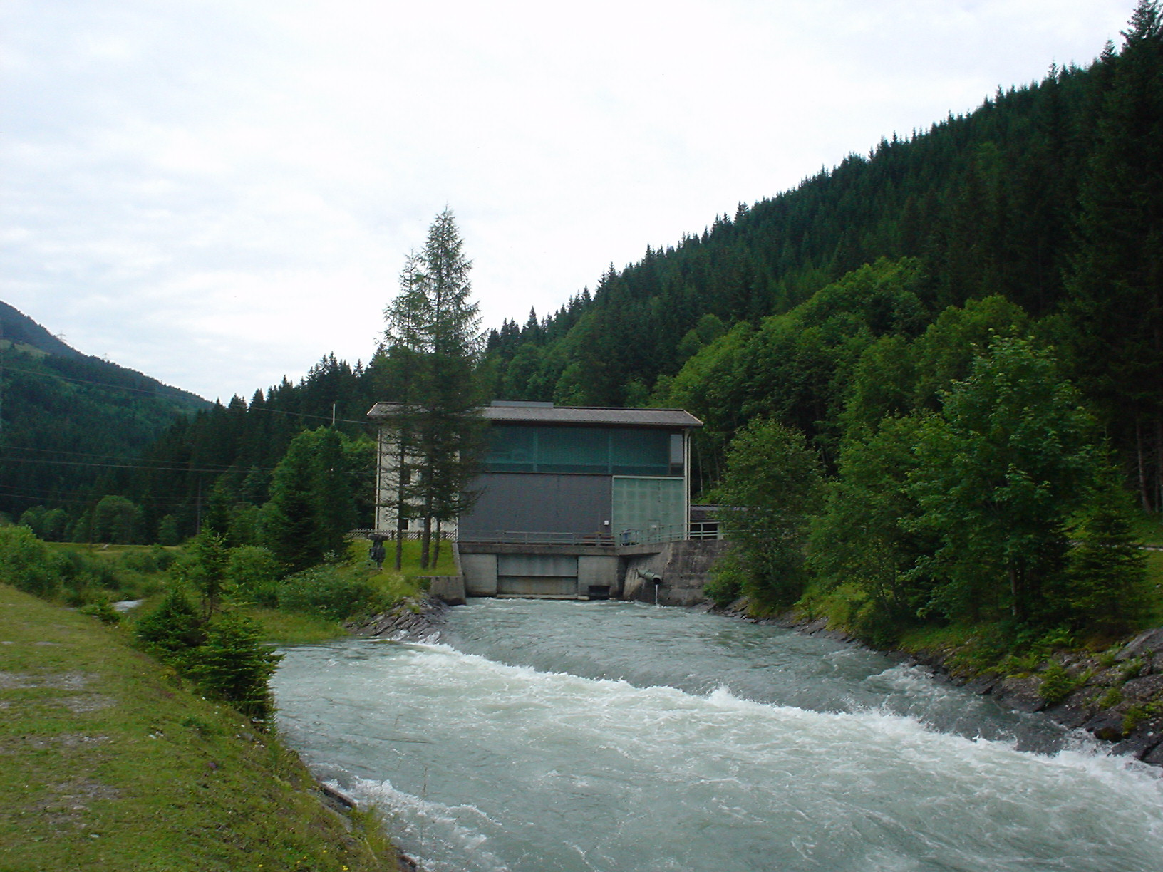 Kraftwerk Funsingau in vollem Betrieb.